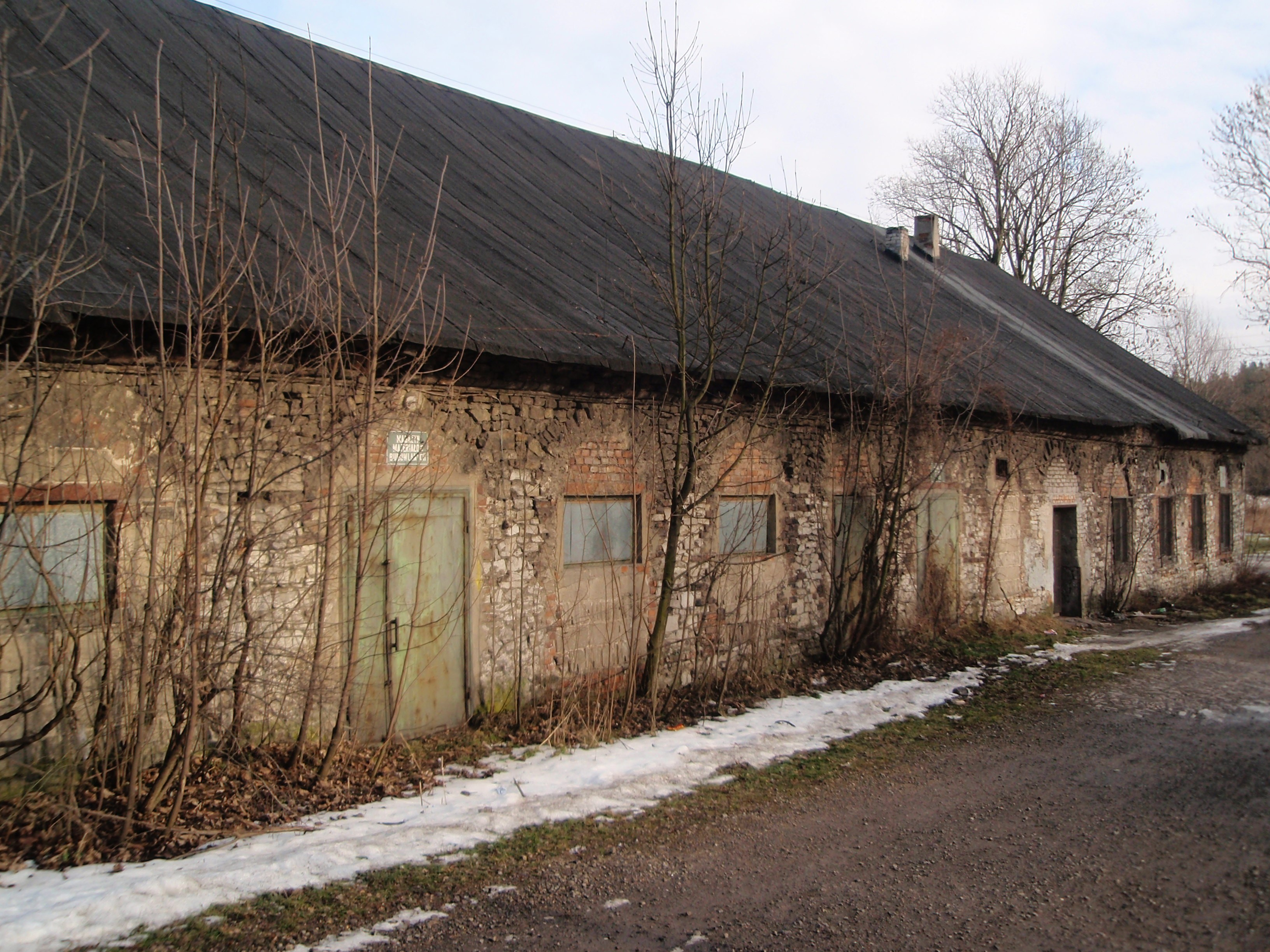 Sławków w woj. śląskim - zabudowania starej walcowni